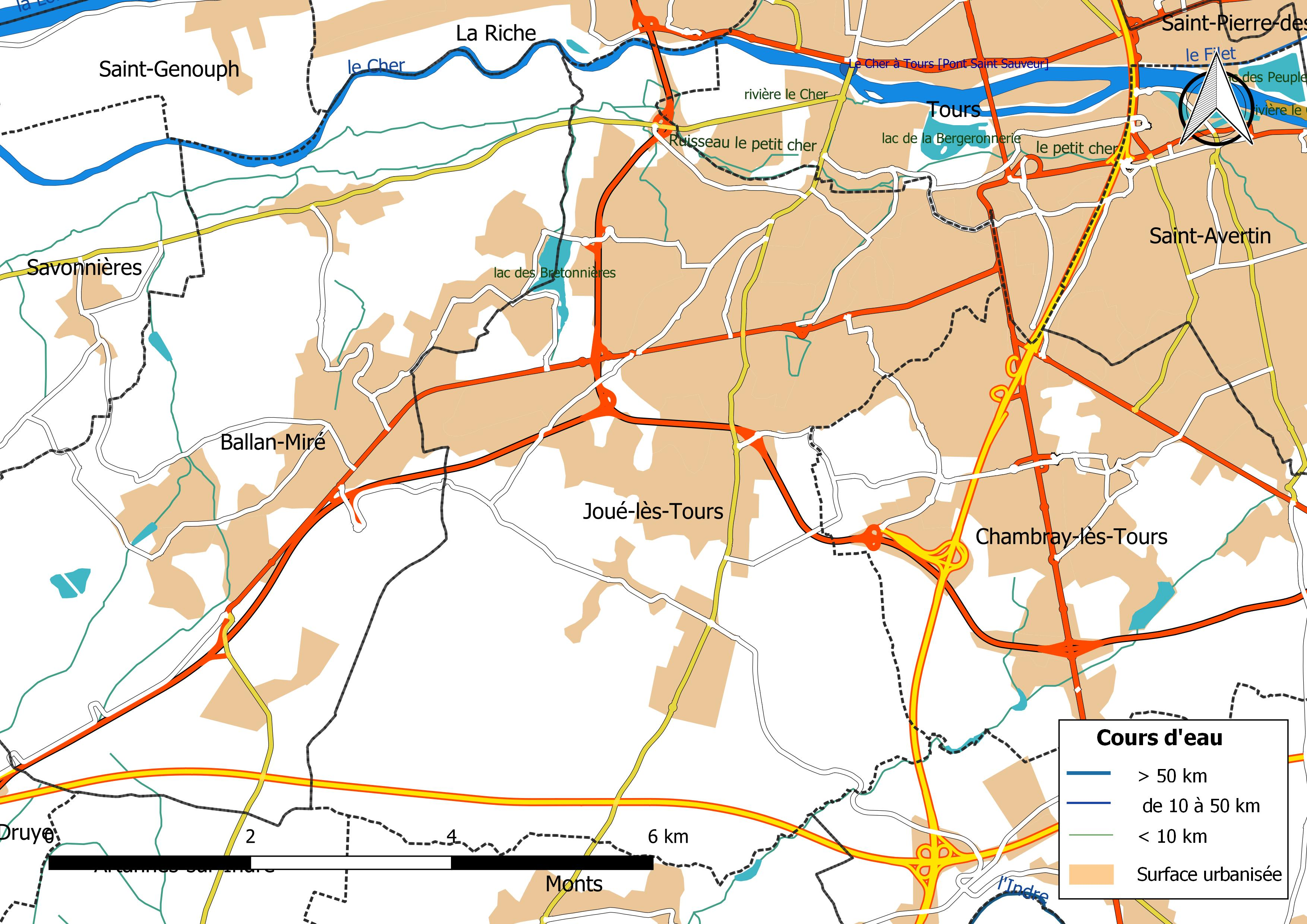 Carte du réseau hydrographique de la commune de Joué-lès-Tours (France).